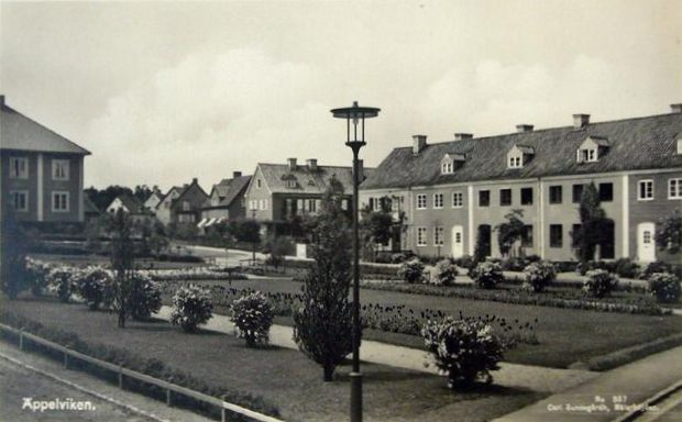 Äppelvikens engelska radhus, Bromma